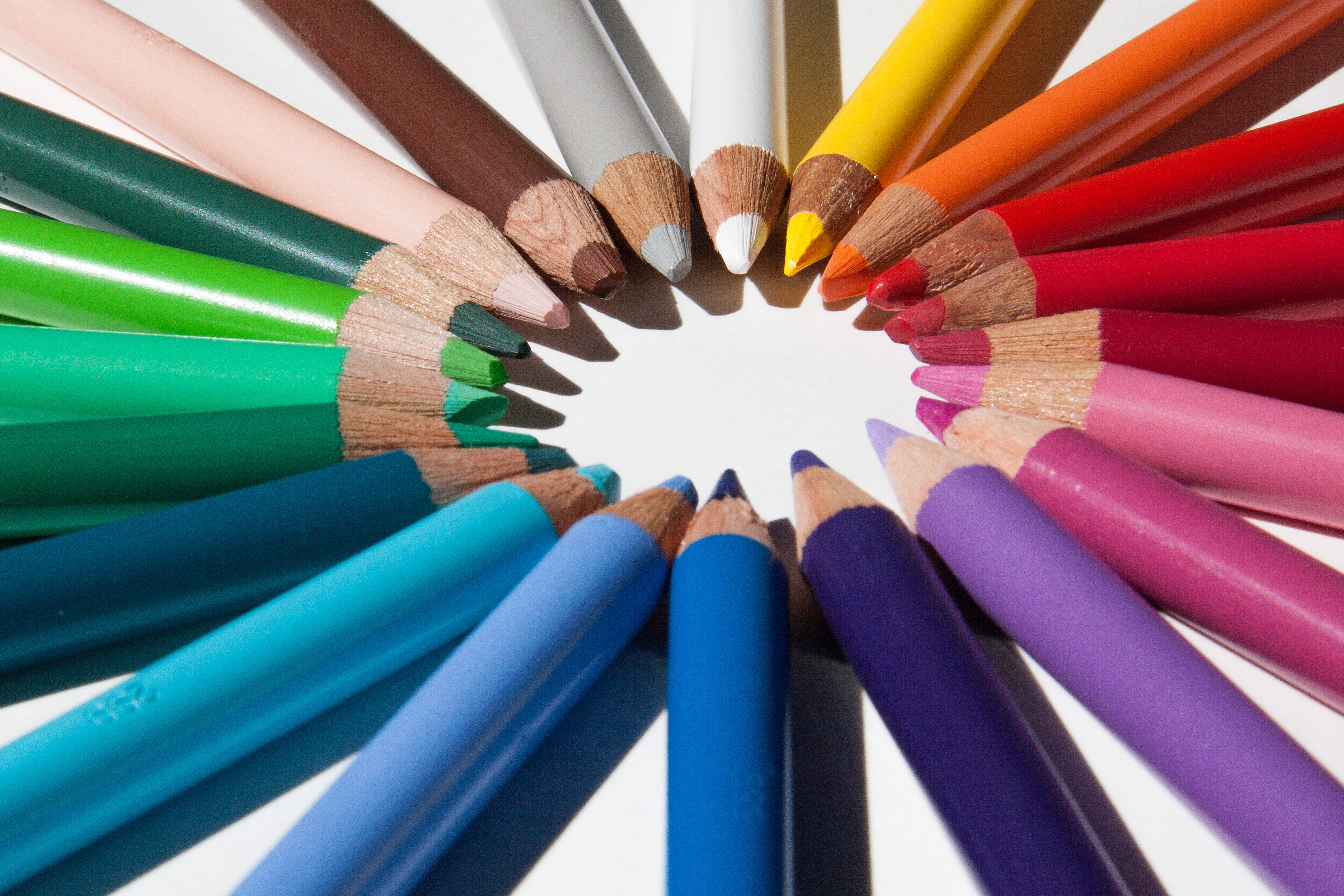 Taille : 4752 x 3168 (4.8 MB)